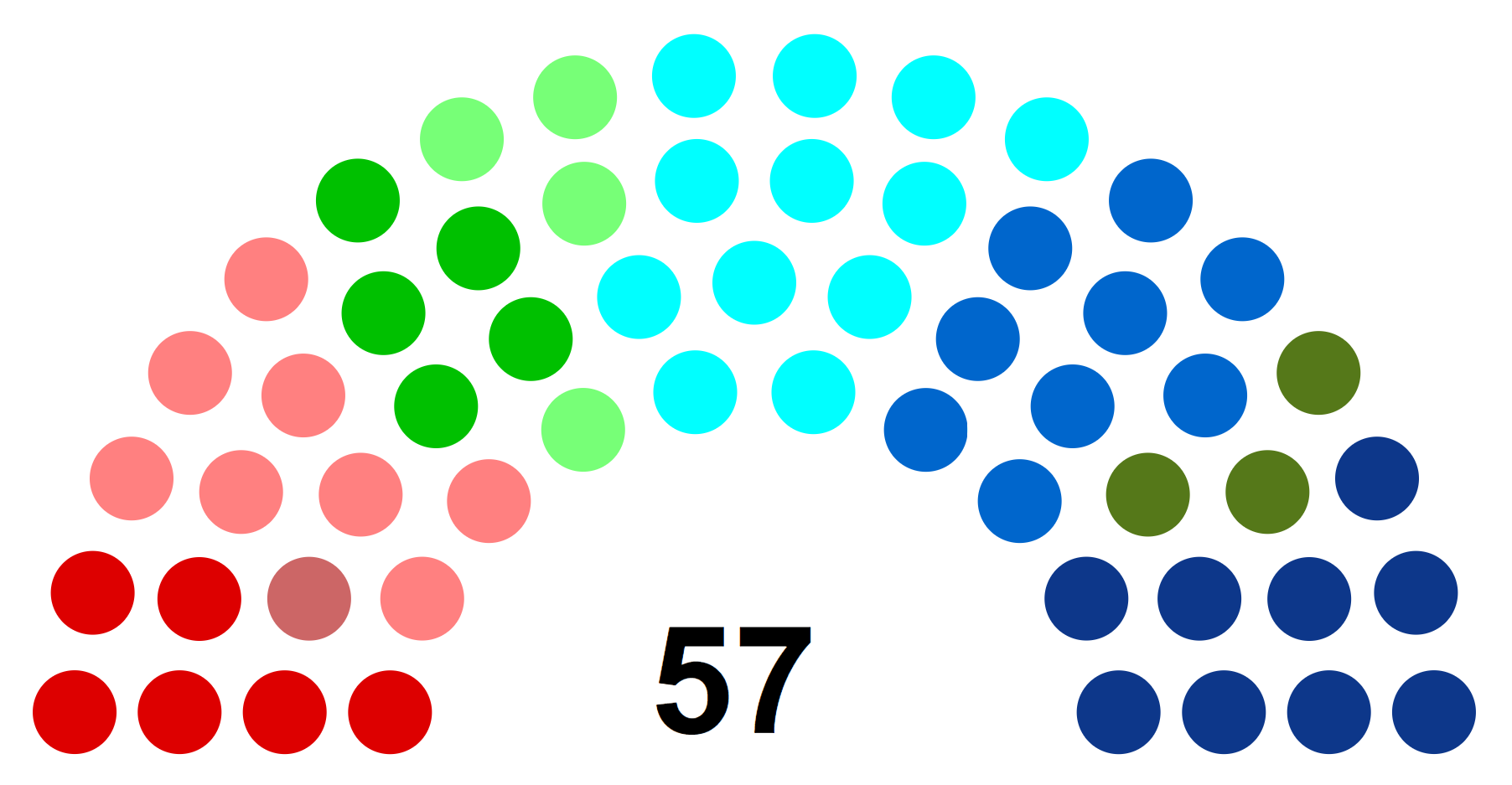 Partis politiques représentés au Conseil régional de Picardie en 1997